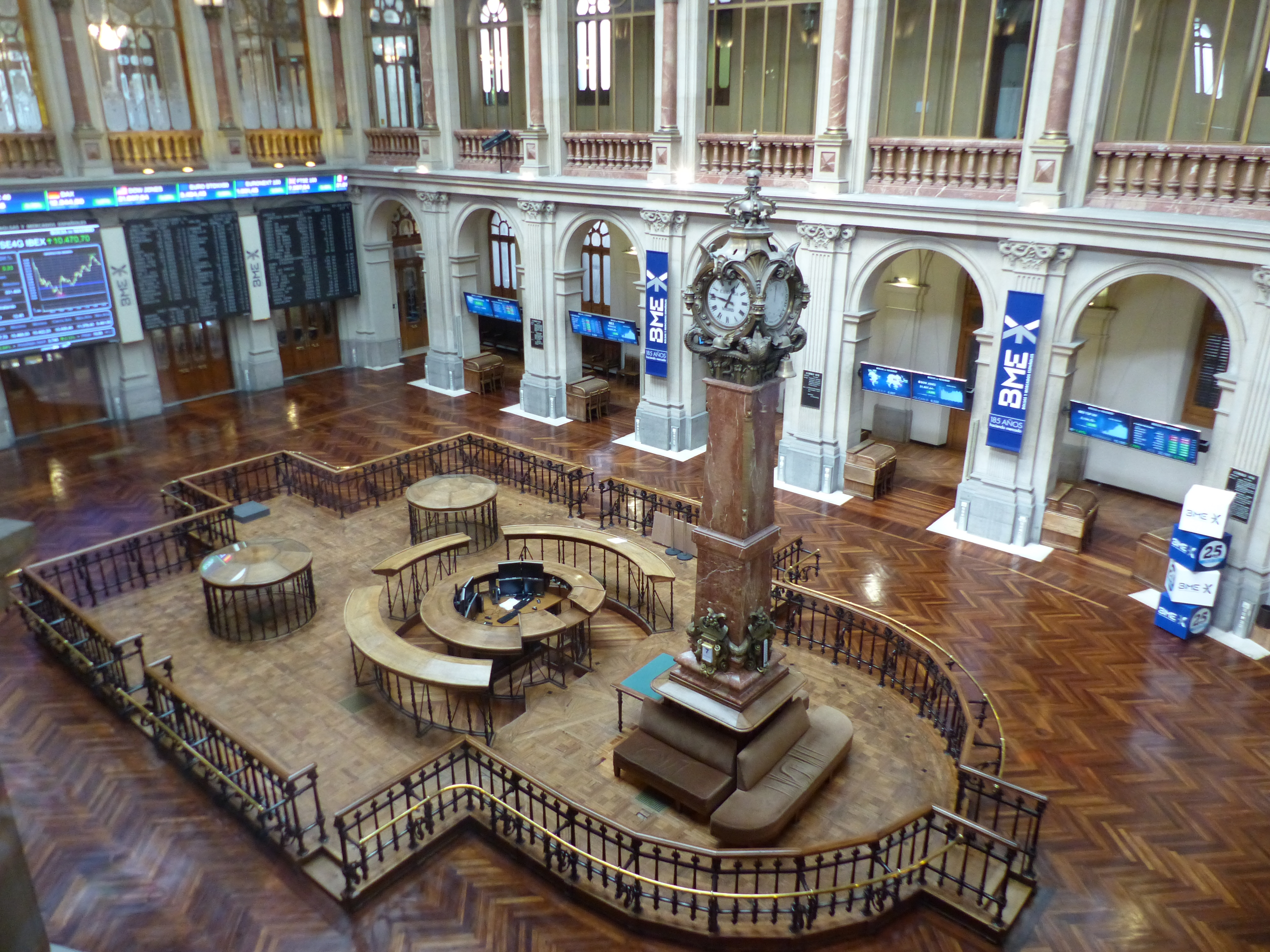 Interior del Palacio de la Bolsa, Madrid